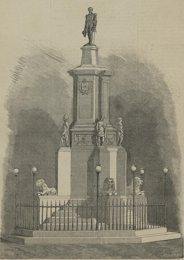 BRAZIL. — Monumento erigido na cidade do Pará, ao General Hilário Maximiniano Antunes Gurjão, recentemente inaugurada.